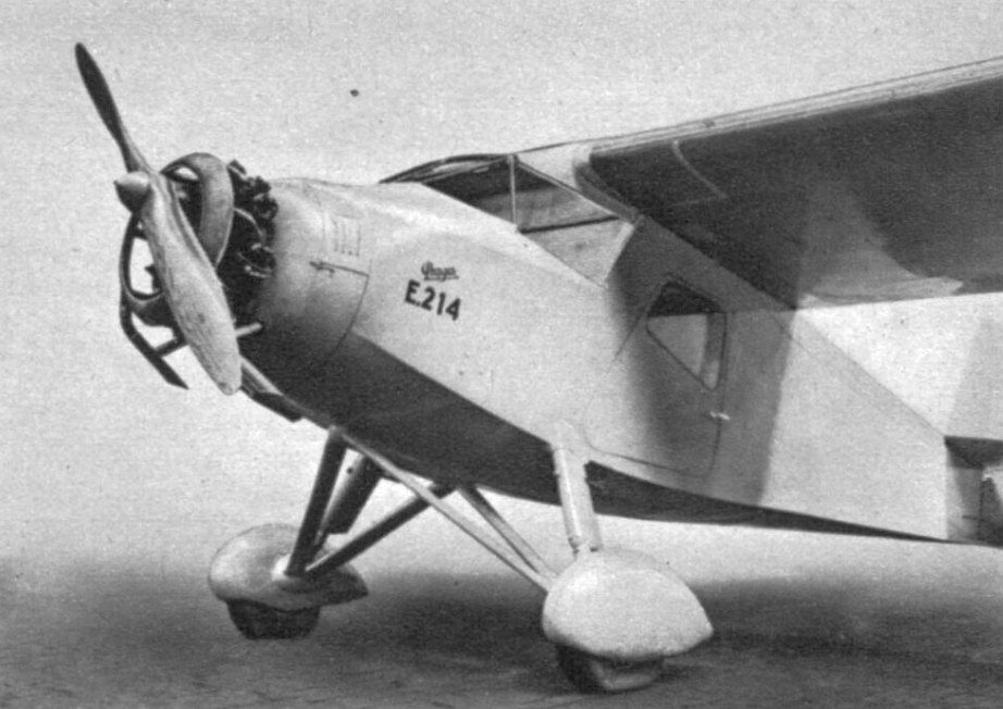 Praga E-214 (1934)